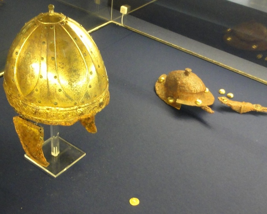 Fürstenhelm